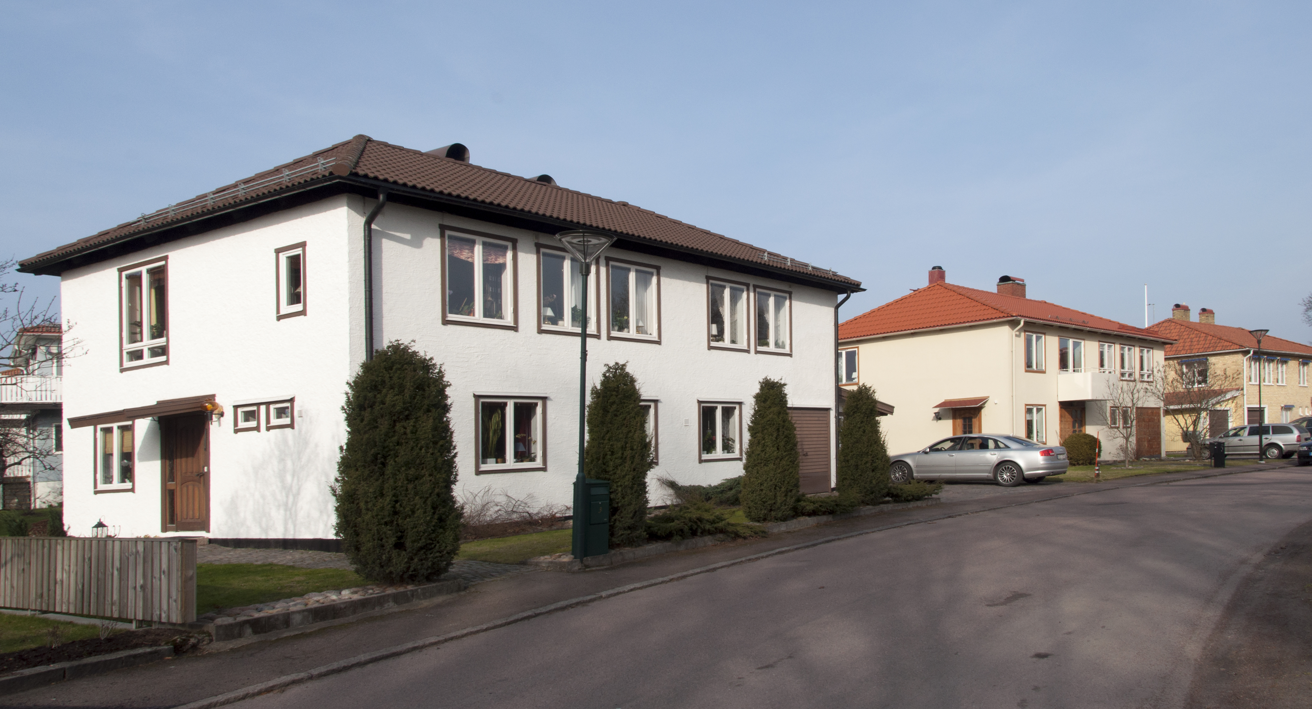 Brunnsgatan, Karlstad. f.v Vattumannen 15, Byggnadsår 1951, Arkitekt Carl-Fredrik Holmer Vattumannen 14, Byggnadsår 1951, Arkitekt Gunnar Hallström Vattumannen 13, Byggnadsår 1951, Arkitekt Enar Eskilsson